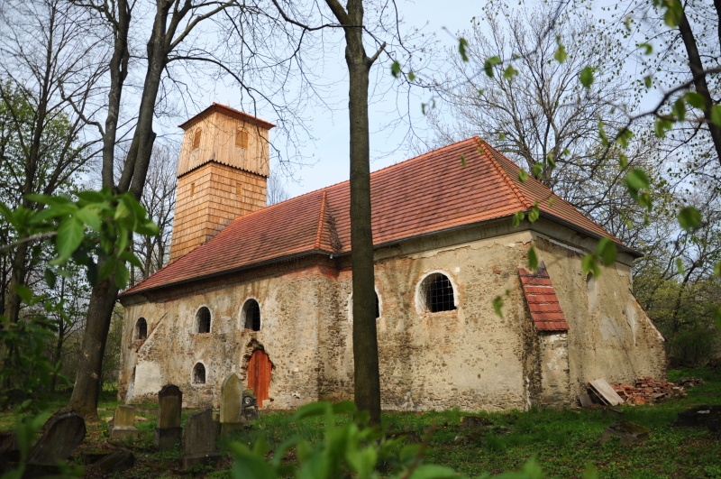 Kostel sv. Jiří - Pelhřimovy